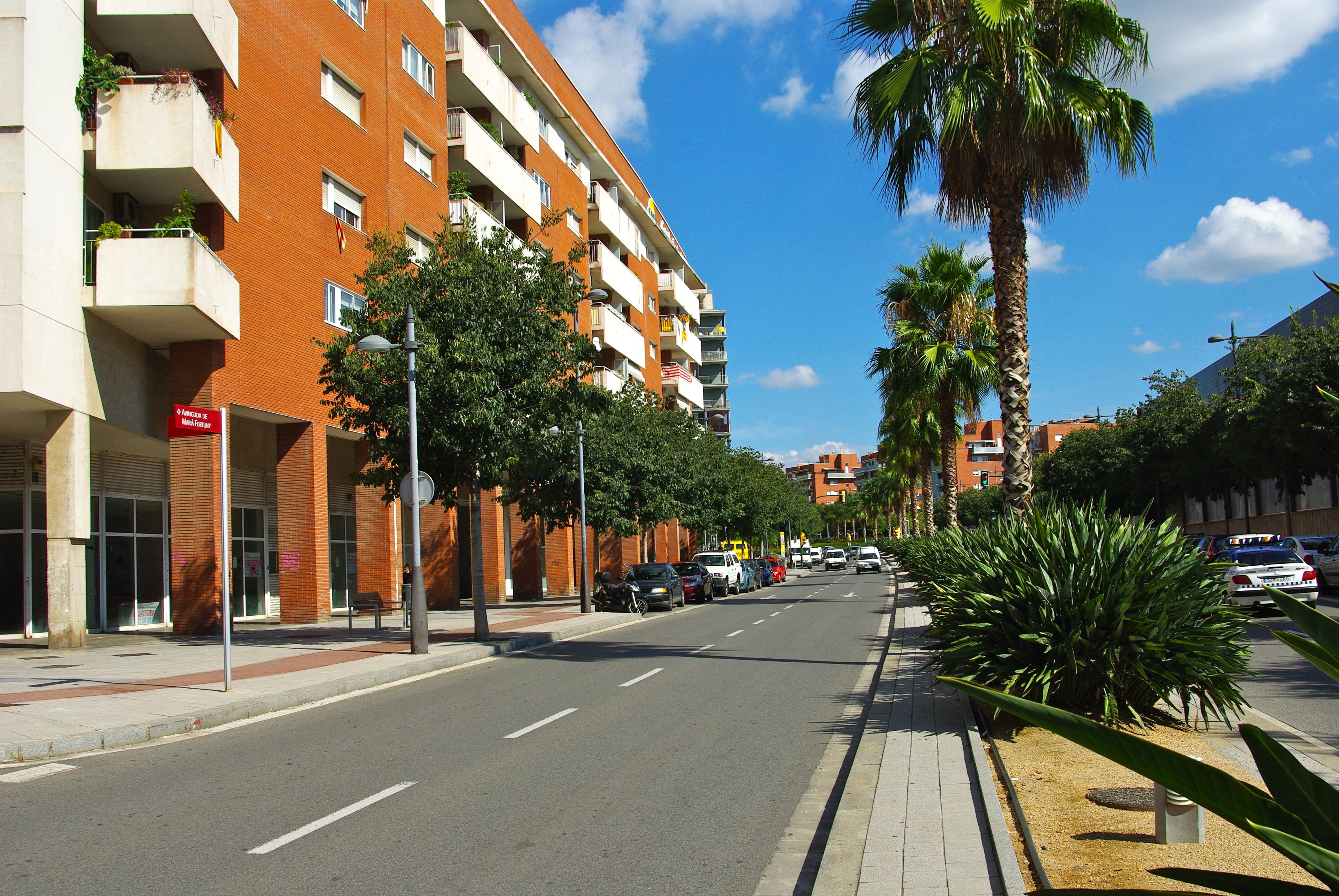 Avinguda de Marià Fortuny, que travessa l'antiga partida del Vilar, a Reus